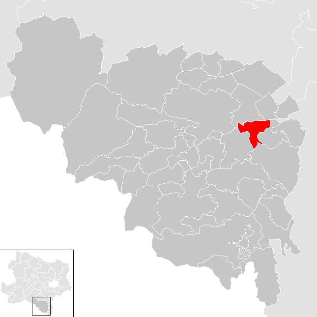 Bezirk Neunkirchen